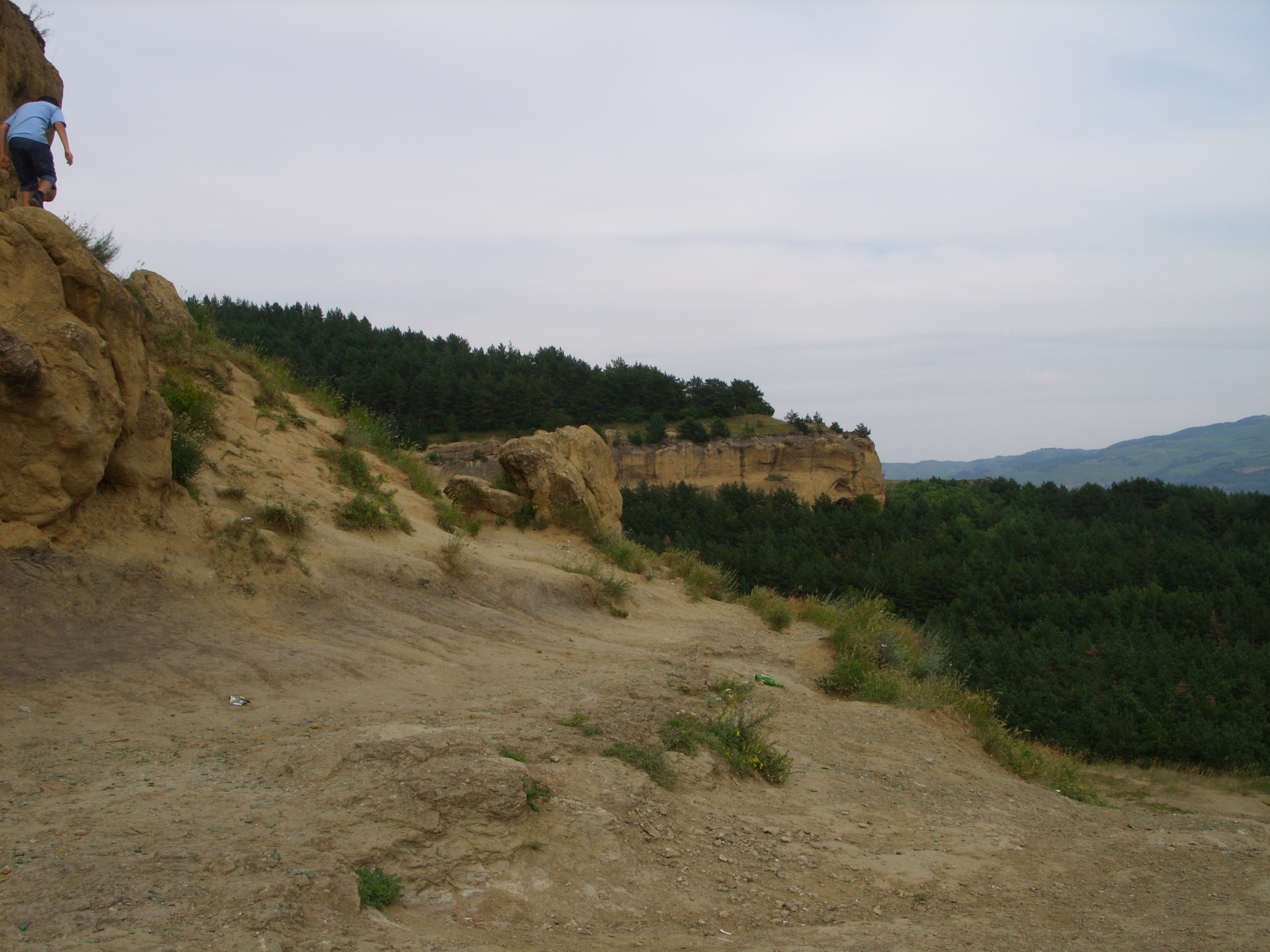 вблизи г. Кисловодска